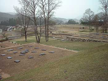 Natsumi Templesite